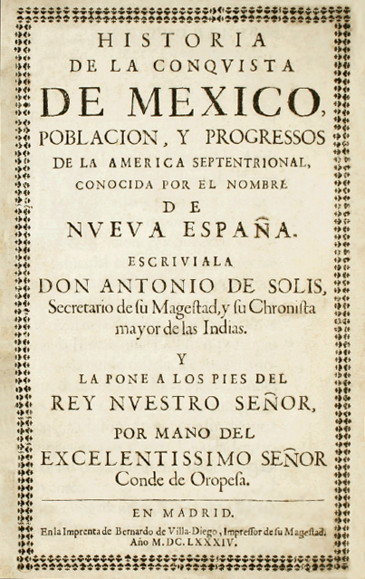 Antonio de Solís. Historia de la conquista de México, población y progresos de la América septentrional, conocida con el nombre de Nueva España. Madrid: Impr. de Bernardo de Villa-Diego; 1684.